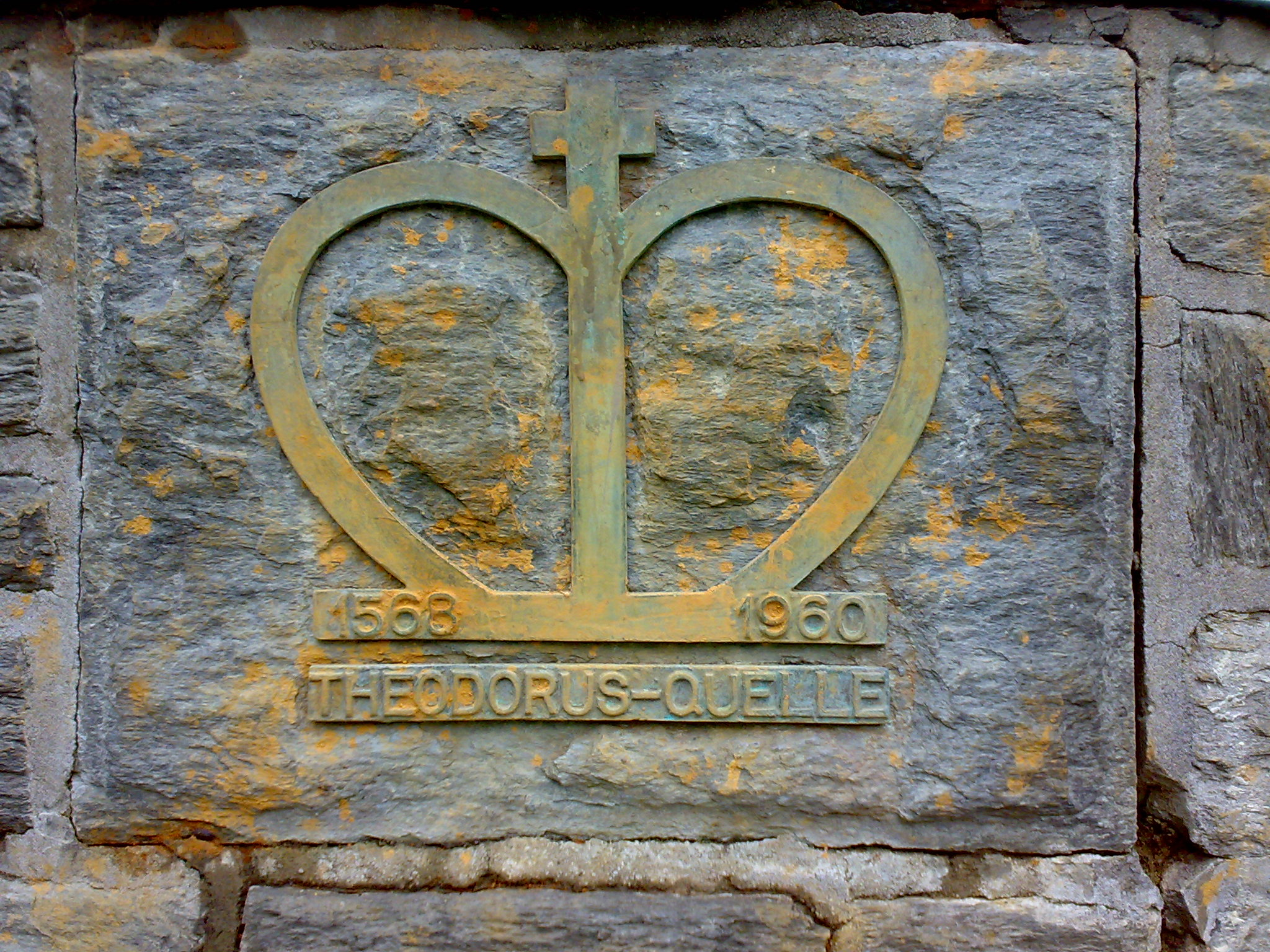 Quellenpark Kronthal, Theodorusquelle